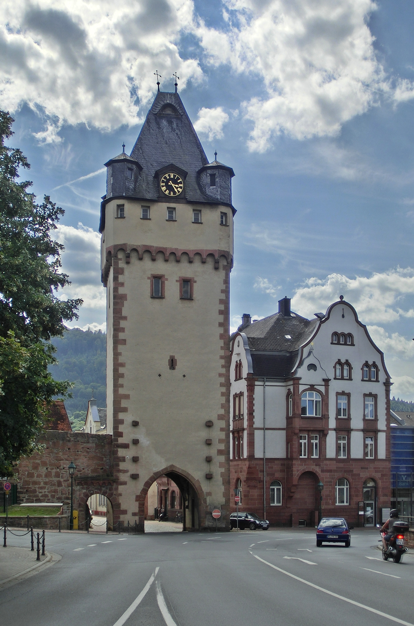 Das Würzburger Tor am Ostrand von Miltenberg, Unterfranken.